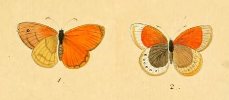 Coenonympha lyllus, syn. Coenonympha pamphilus lyllus Eugen Johann Christoph Esper: Die Schmetterlinge in Abbildungen nach der Natur mit Beschreibungen. Theil I. Die Tagschmetterlinge, 1805